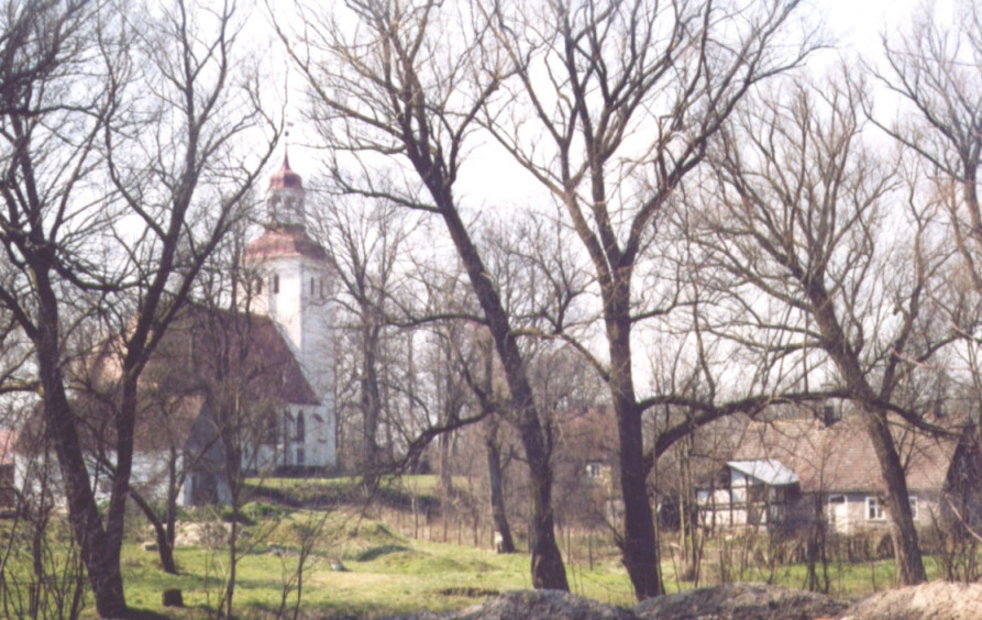 Duninowo: kościół i otoczenie